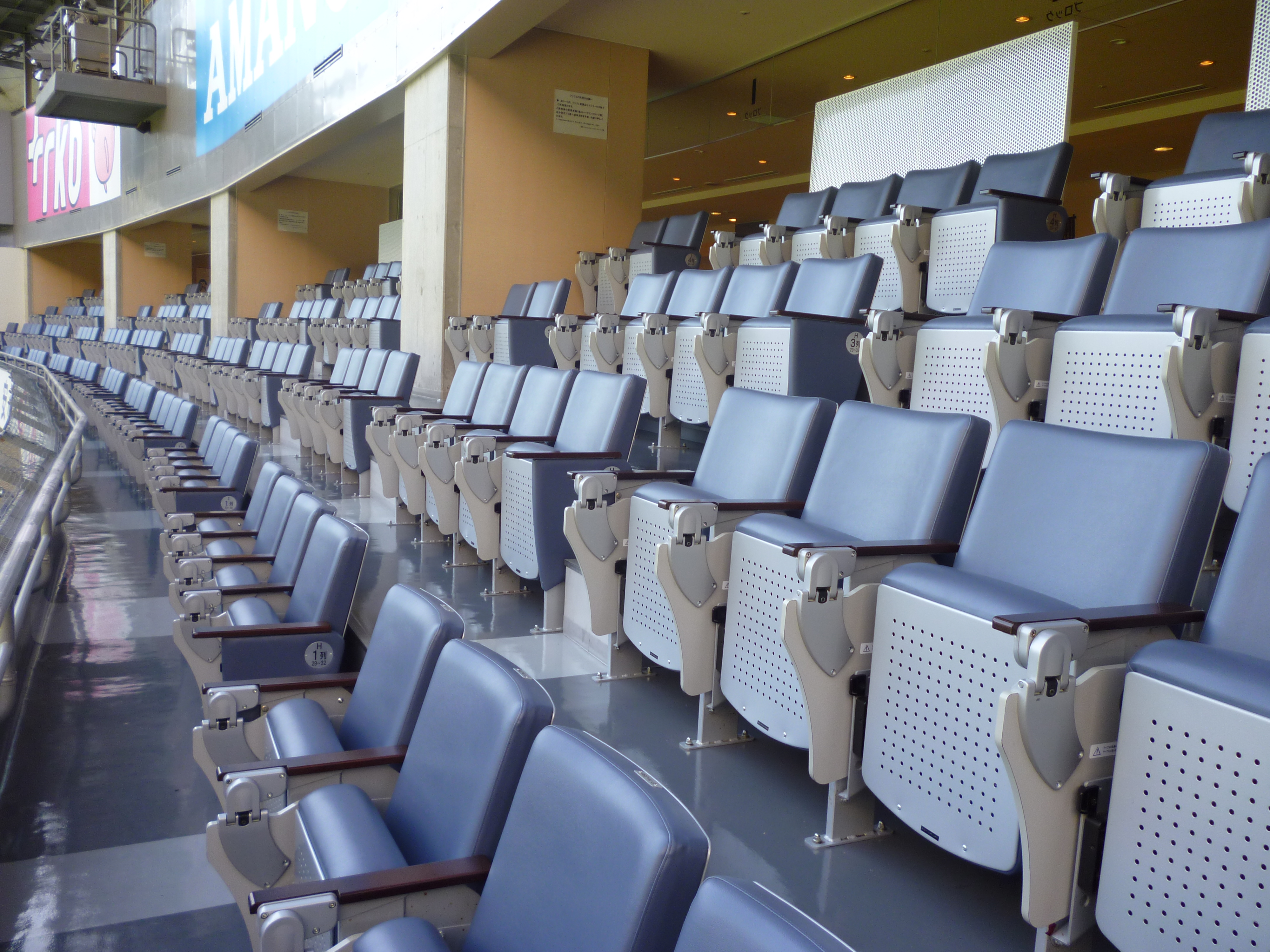 ヴィクトリウィングのシートの様子です。